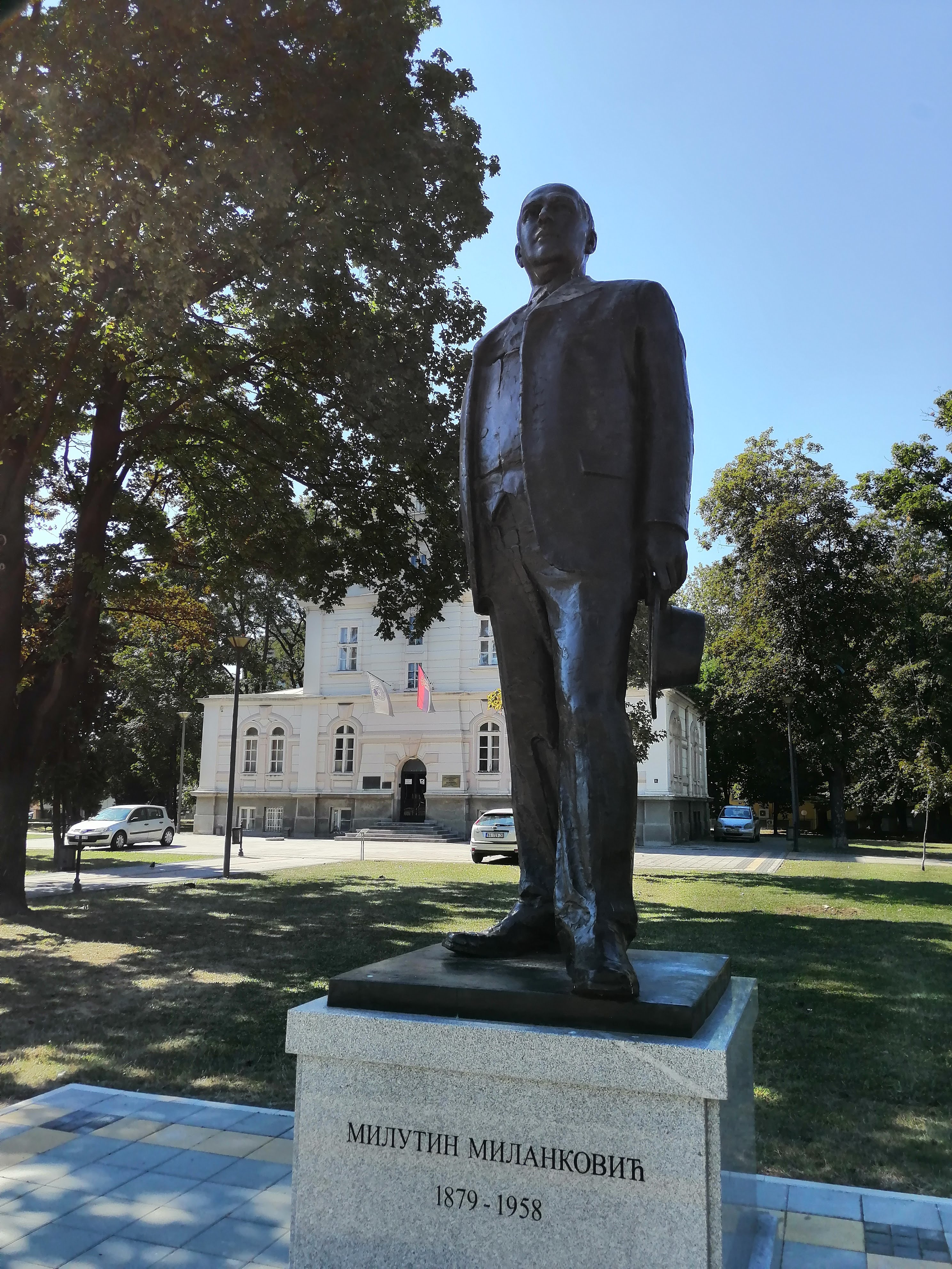 Srpski (latinica): Meteorološka opservatorija Beograd sa spomenikom Milutinu Milankoviću